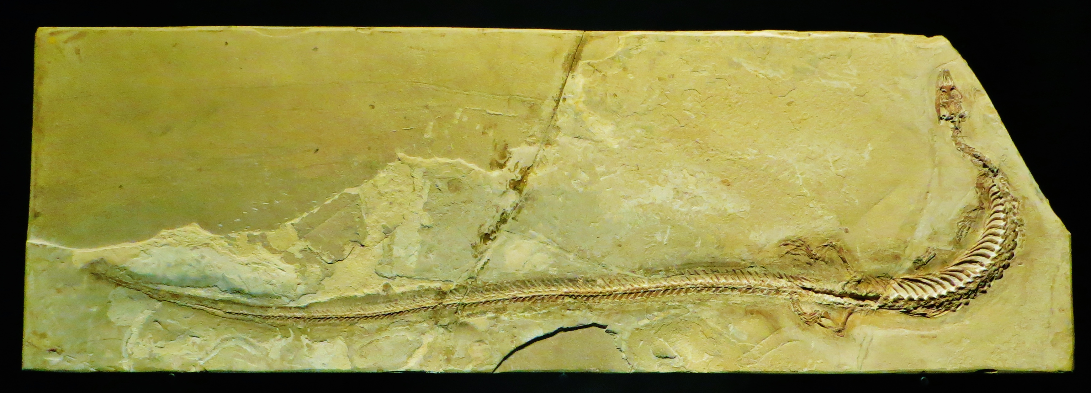 Fossil of Pontosaurus, an extinct reptile- Took the picture at Museo di Storia Naturale di Milano